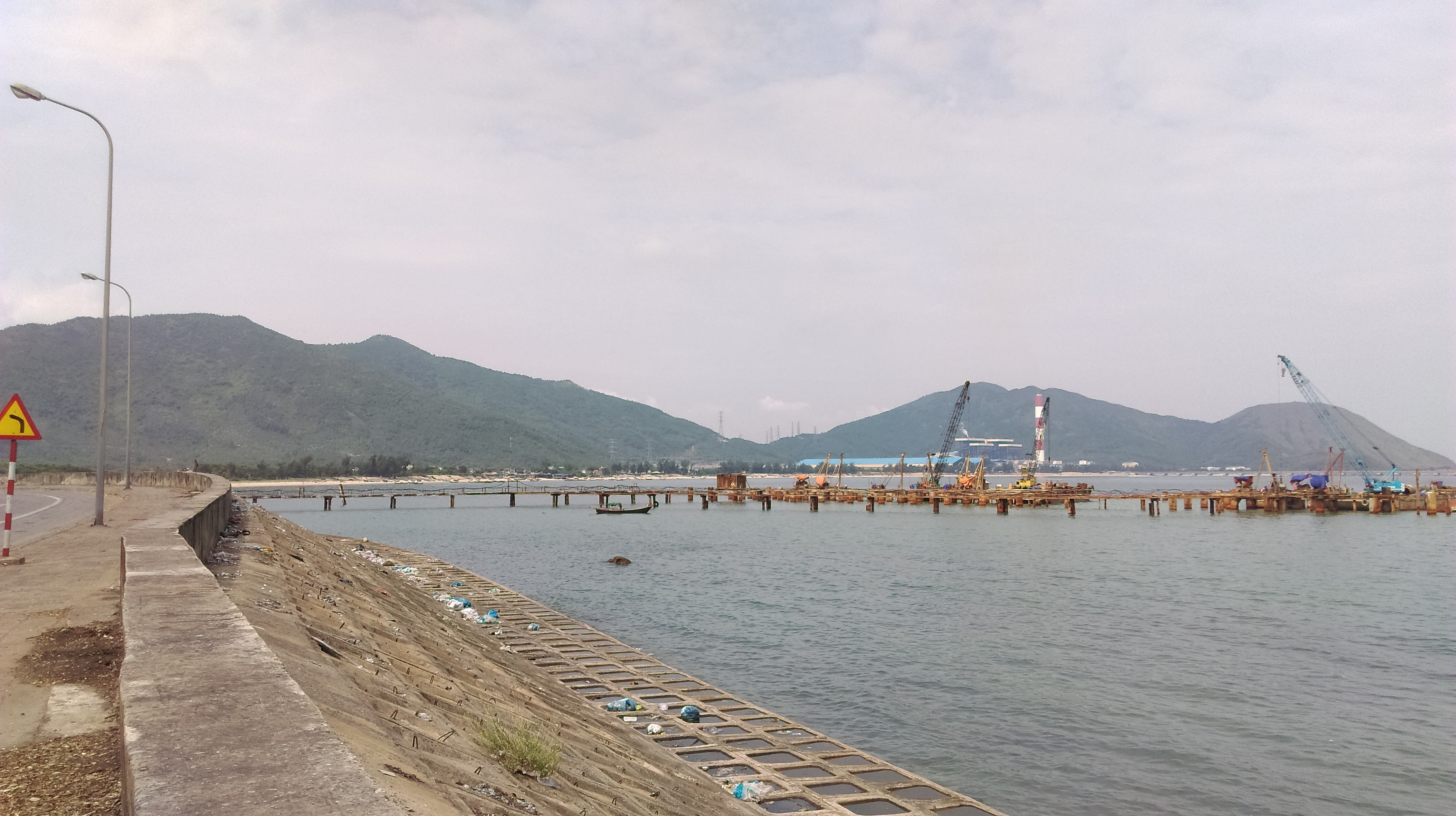 Cảng Hoành Sơn, Vũng Áng, Hà Tĩnh